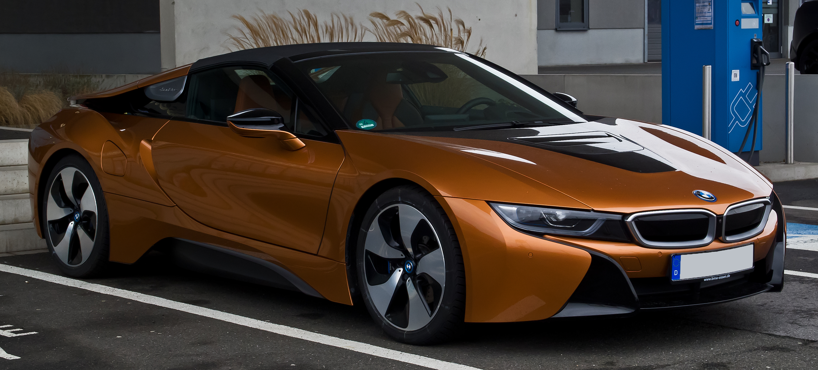 BMW i8 Roadster